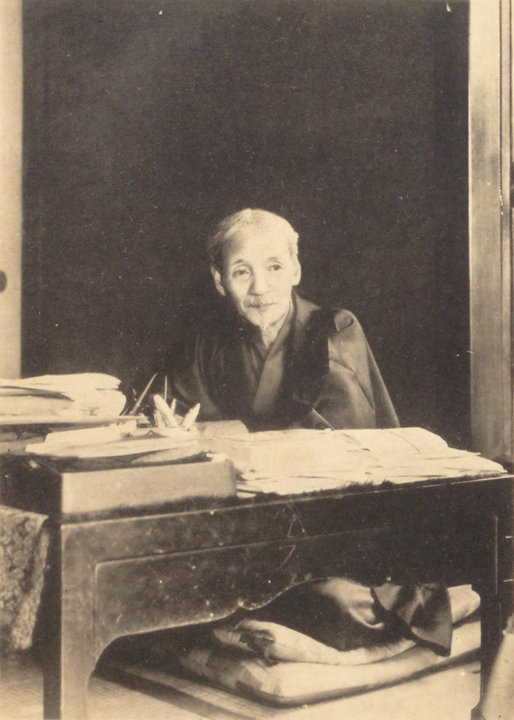 Portrait of Sakurai Joji (桜井錠二, 1858 – 1939)